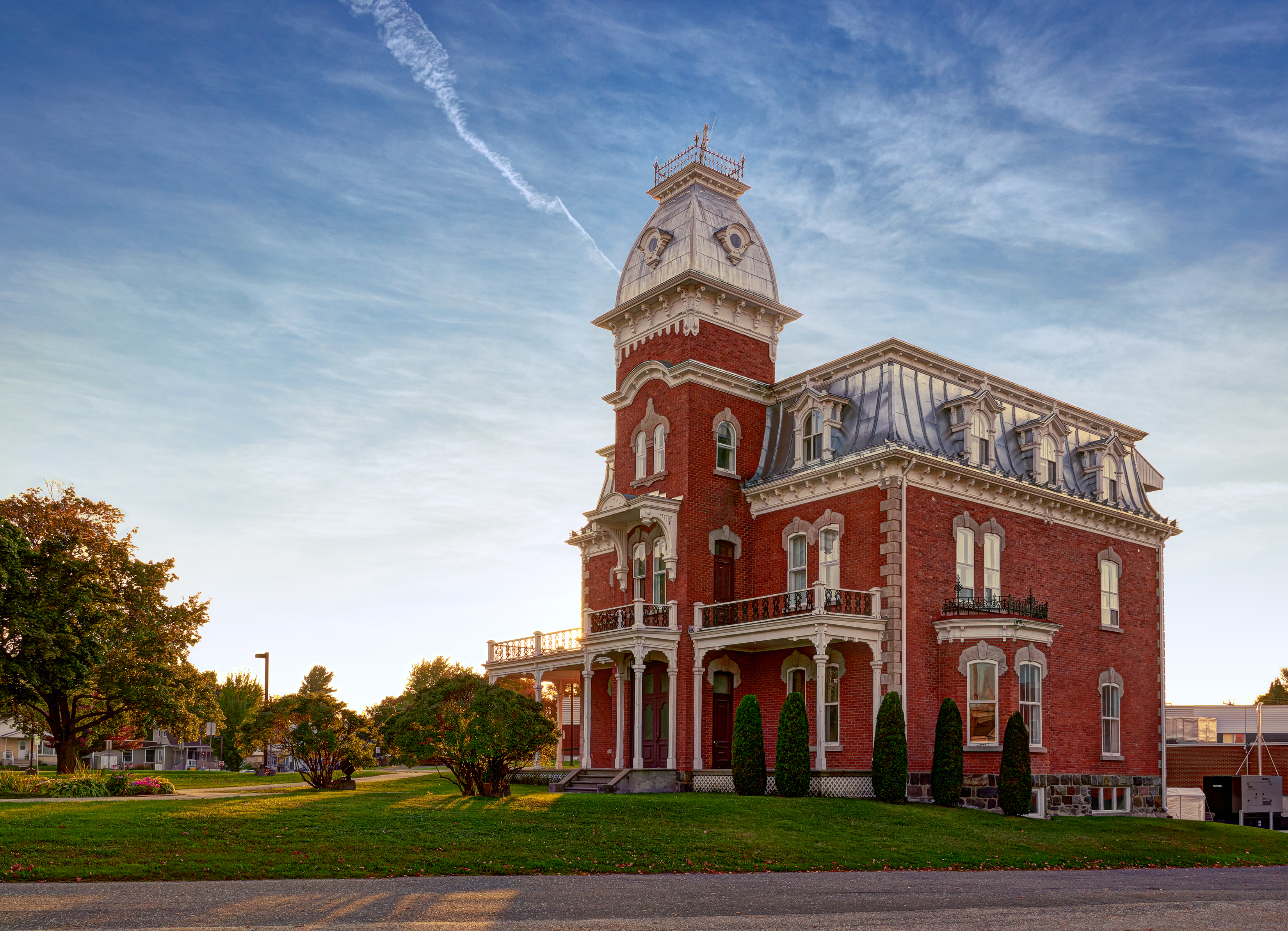 Maison Cormier, 1353, rue Saint-Calixte, Plessisville (Canada). (Protection IP reconnuIP classé. Voir la liste des lieux patrimoniaux du Centre-du-Québec pour plus de détails).